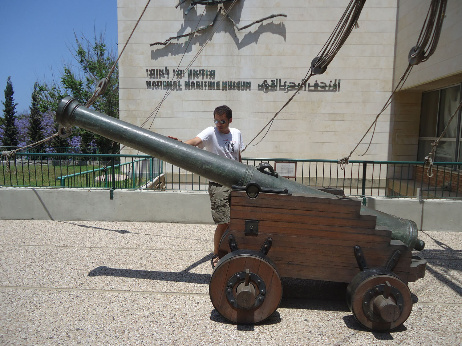 תותח ונציאני מהמאה ה 16 מוצב על מרכב עץ בחזית המוזיאון הימי בחיפה